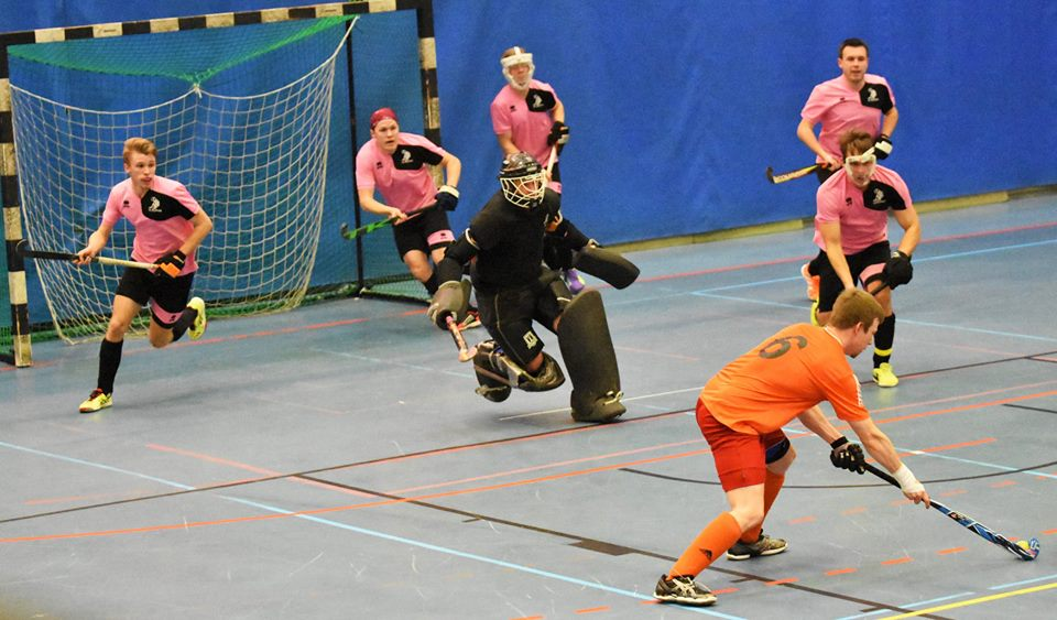 Sisähockeyn miesten SM-sarja: HC Kilppari vs. ABC-Team 5-1 (2-1), 3.1.2016, Samppalinna Palloiluhalli.